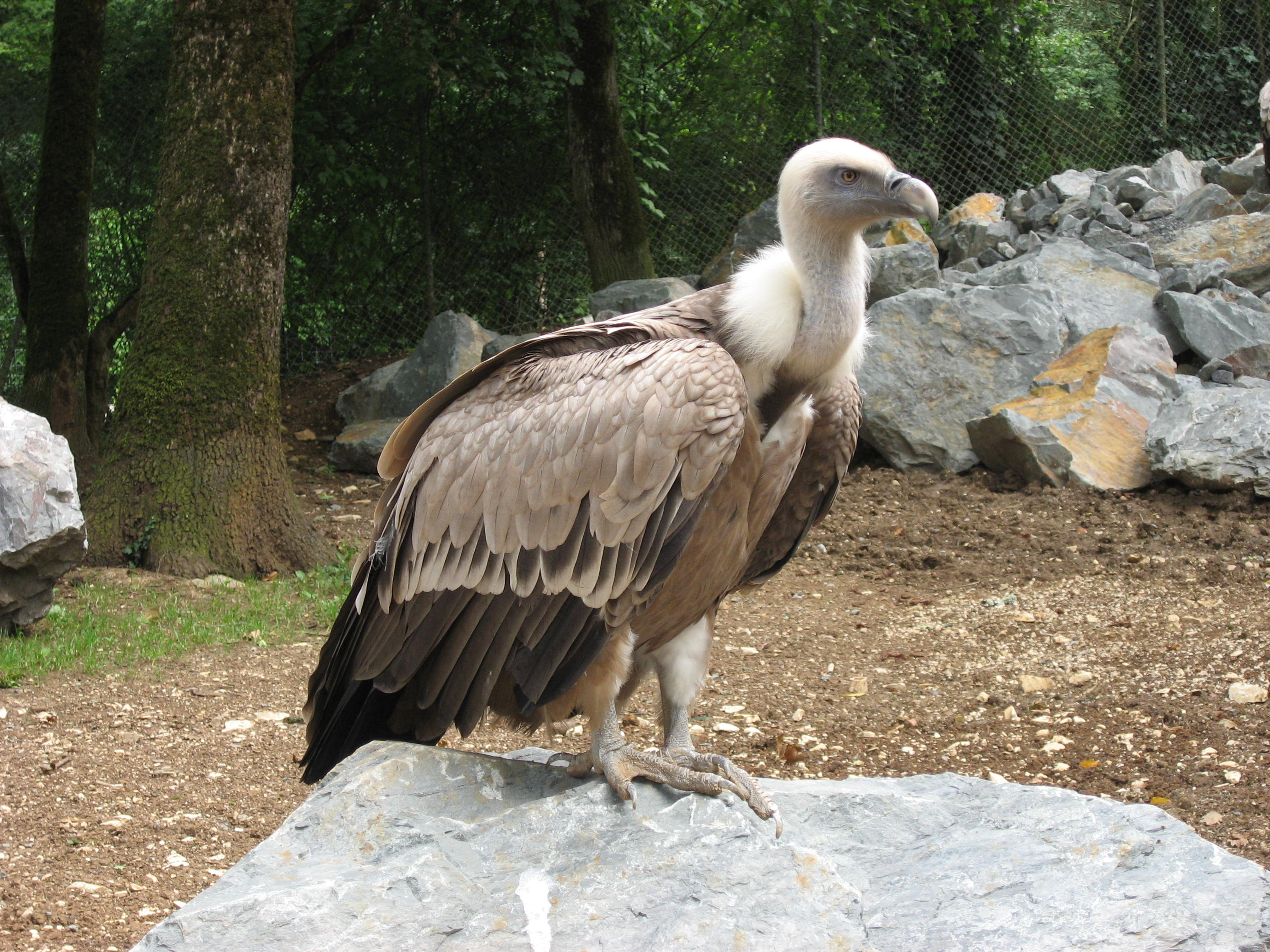 Gyps fulvus in Zoodyssée